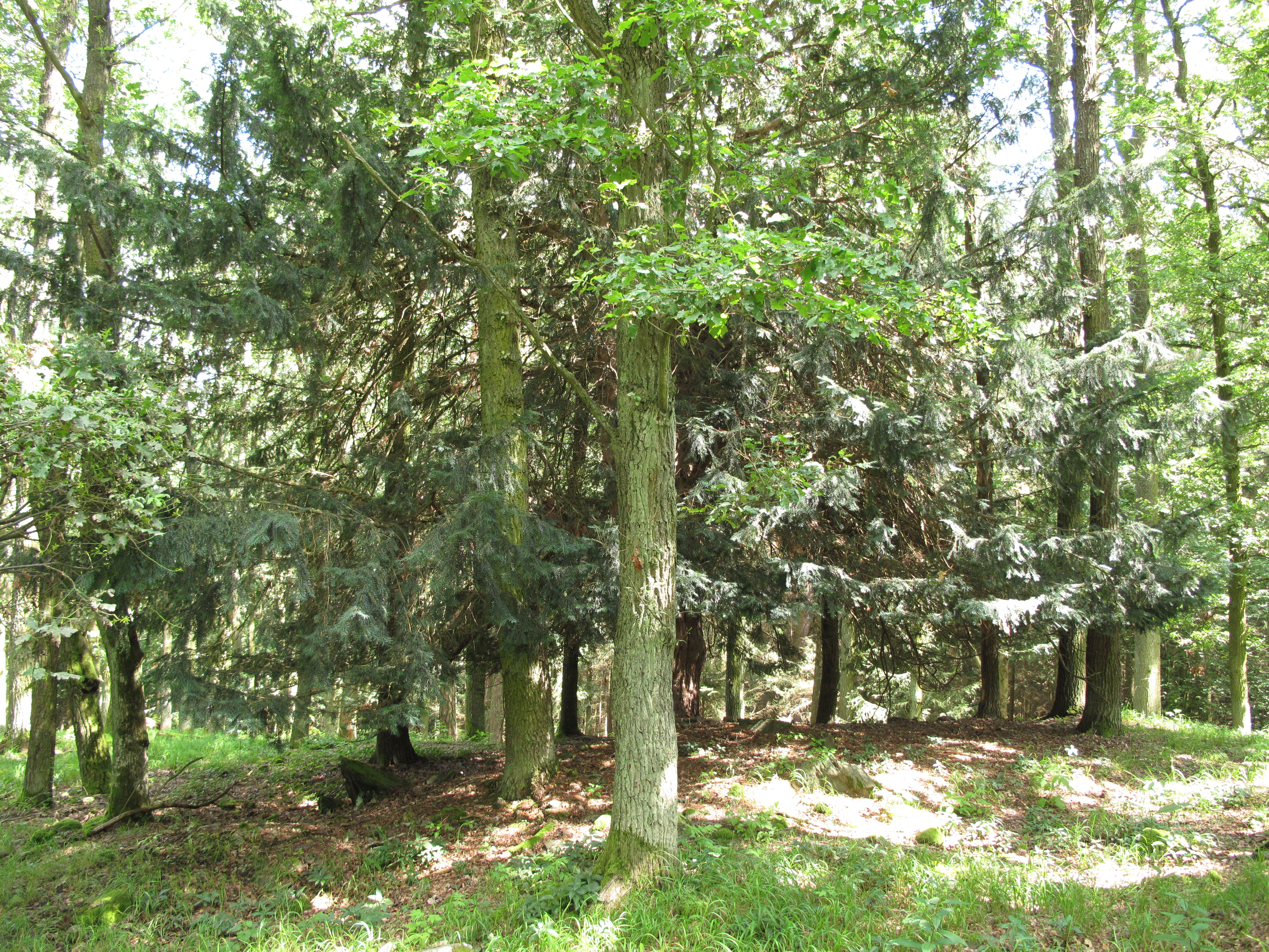 Přírodní rezervace Netřeb, okres Domažlice, Česká republika.